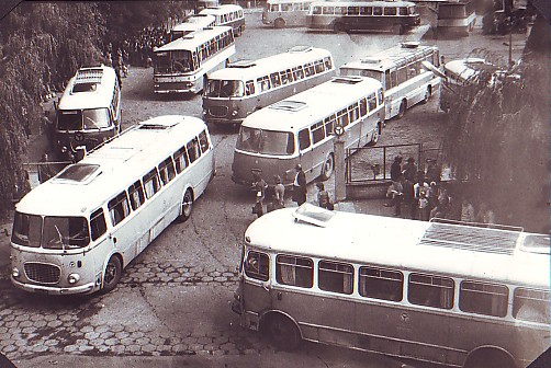 Stary dworzec PKS Nova Fabryczna